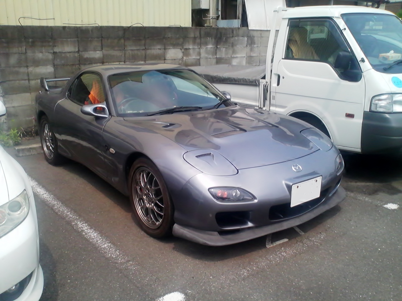 FD3S型マツダ・RX-7スピリットR（ホイールの色からタイプAと思われる）を撮影。ヘッドライトやドアミラーが非純正となっている。